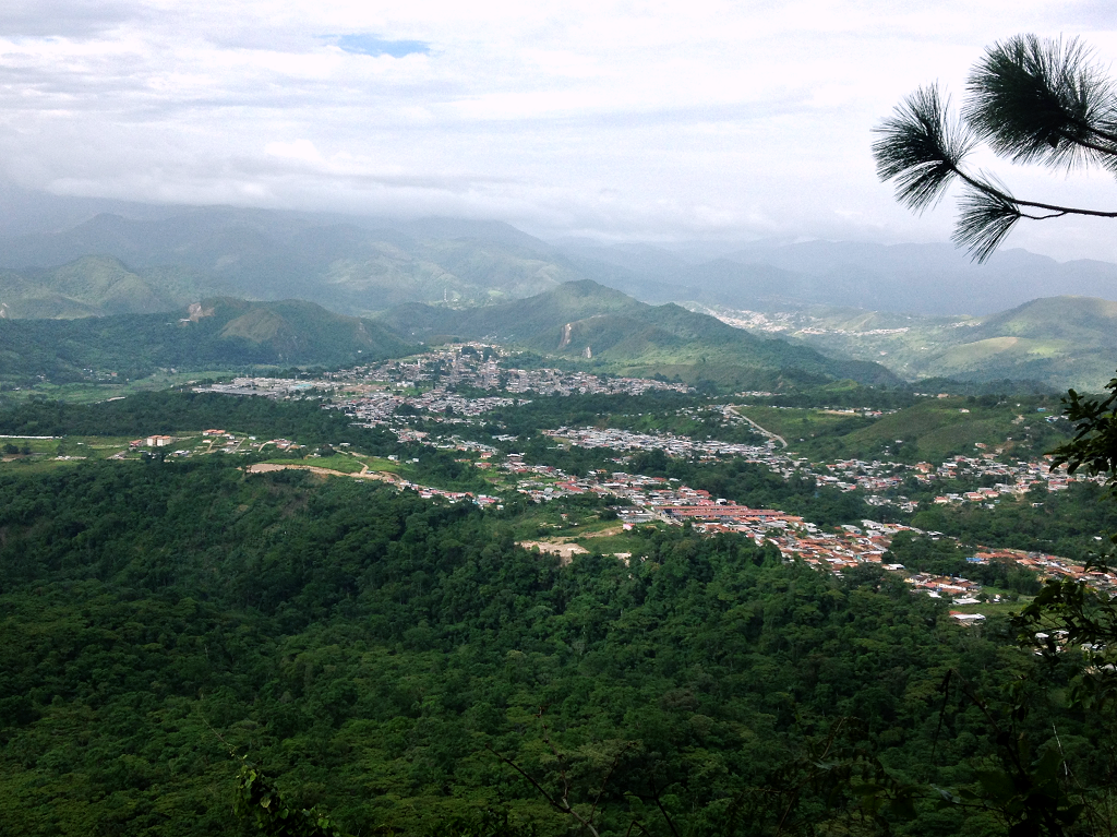 Santa Ana del Táchira, capital del municipio Córdoba.